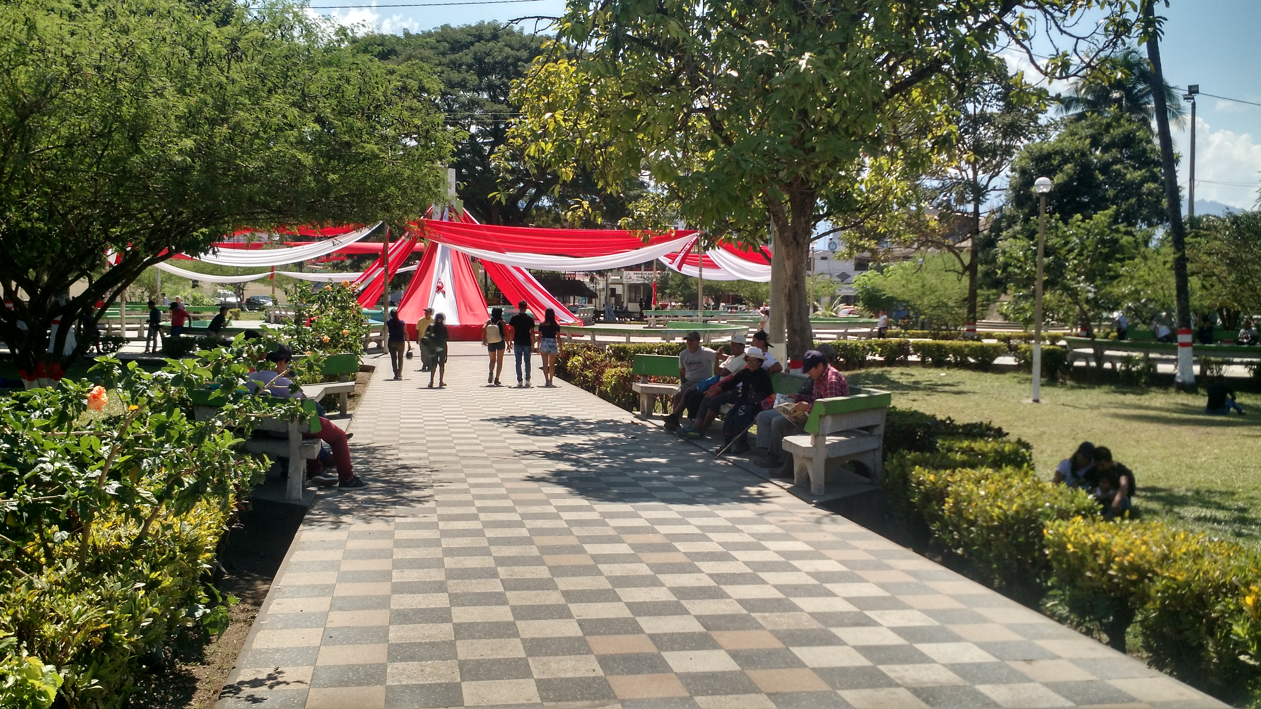 Imagen tomada en fiestas patrias a la plaza principal del distrito de Satipo, Provincia de Satipo